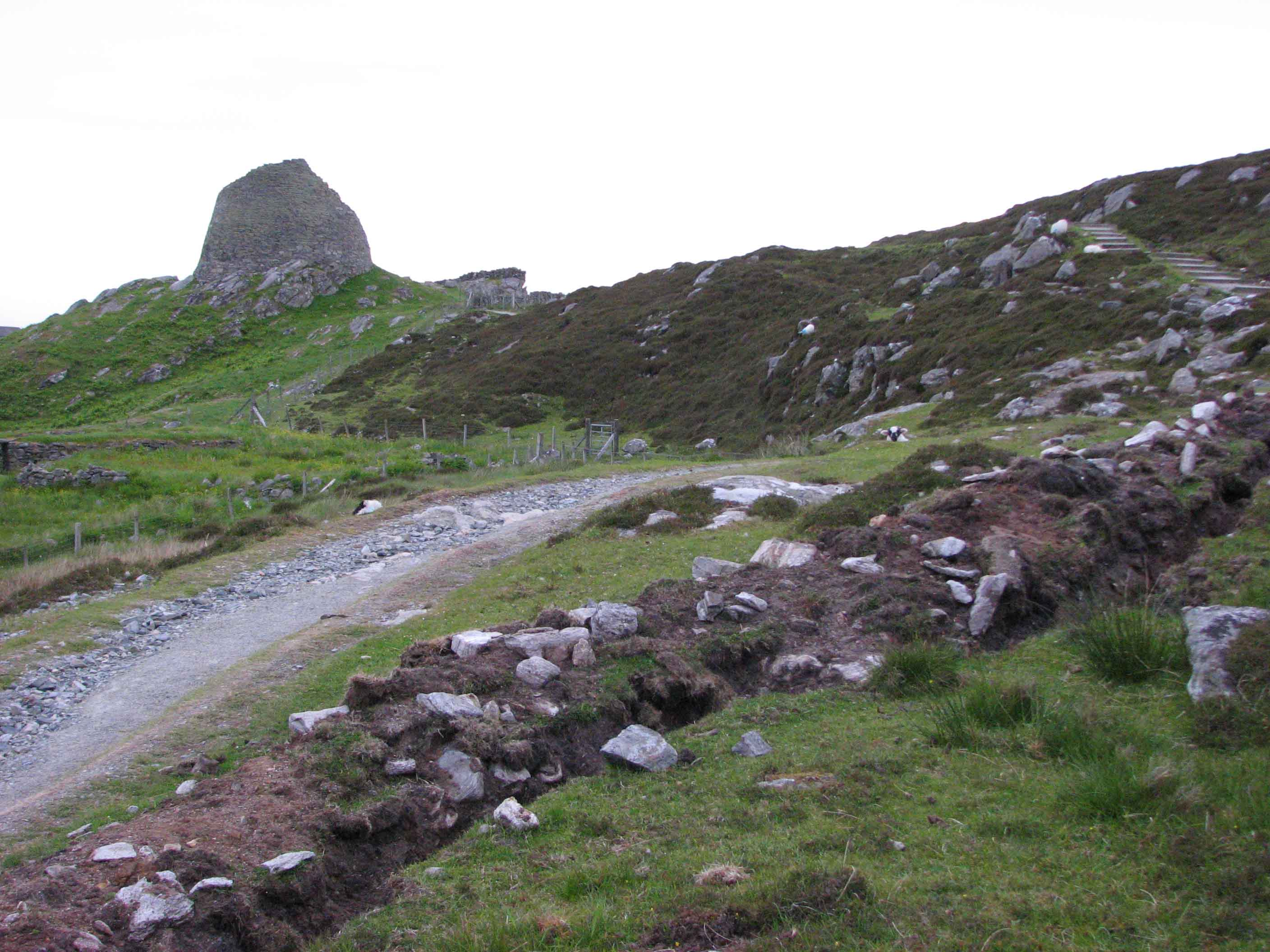 Isle of Lewis, Broch - vaskori épületmaradvány, Anglia